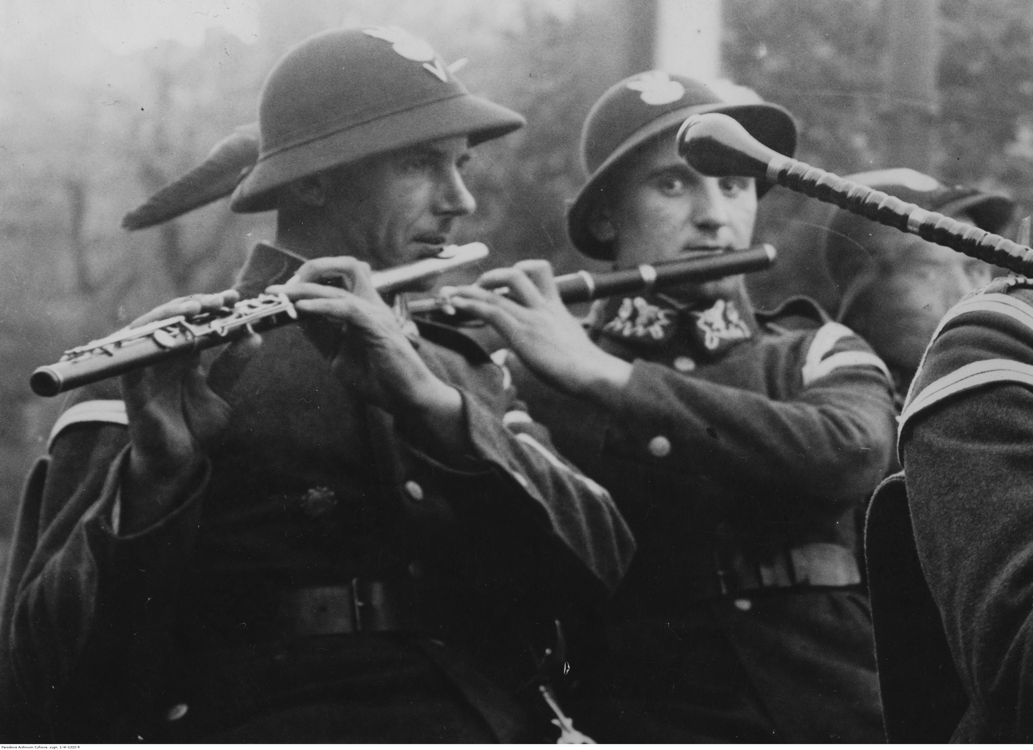 Wizyta 5 Pułku Strzelców Podhalańskich w Krakowie - fleciści w orkiestrze pułkowej; 1935 r. Koncern Ilustrowany Kurier Codzienny - Archiwum Ilustracji. Sygnatura: 1-W-1322-9